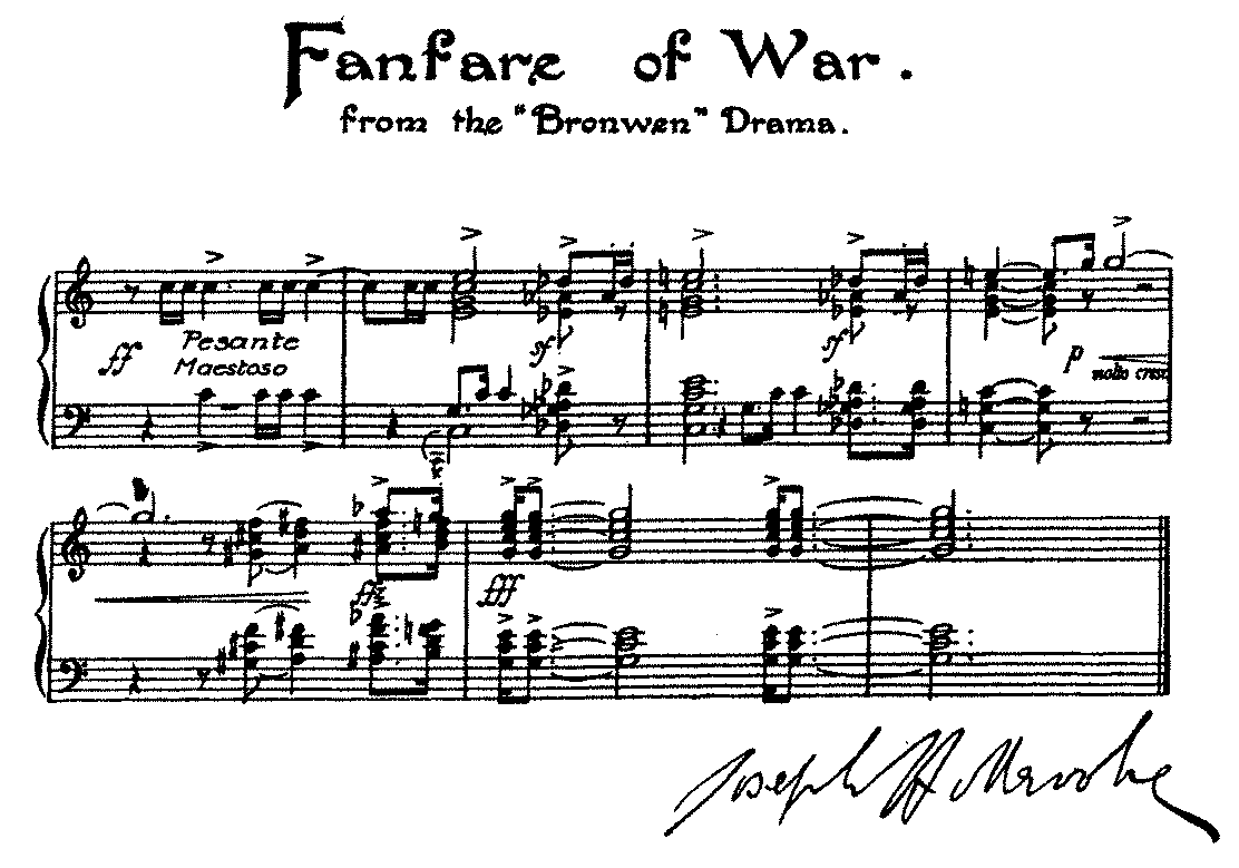 Thème de Browen, opéra de Joseph Holbrooke et sa signature.